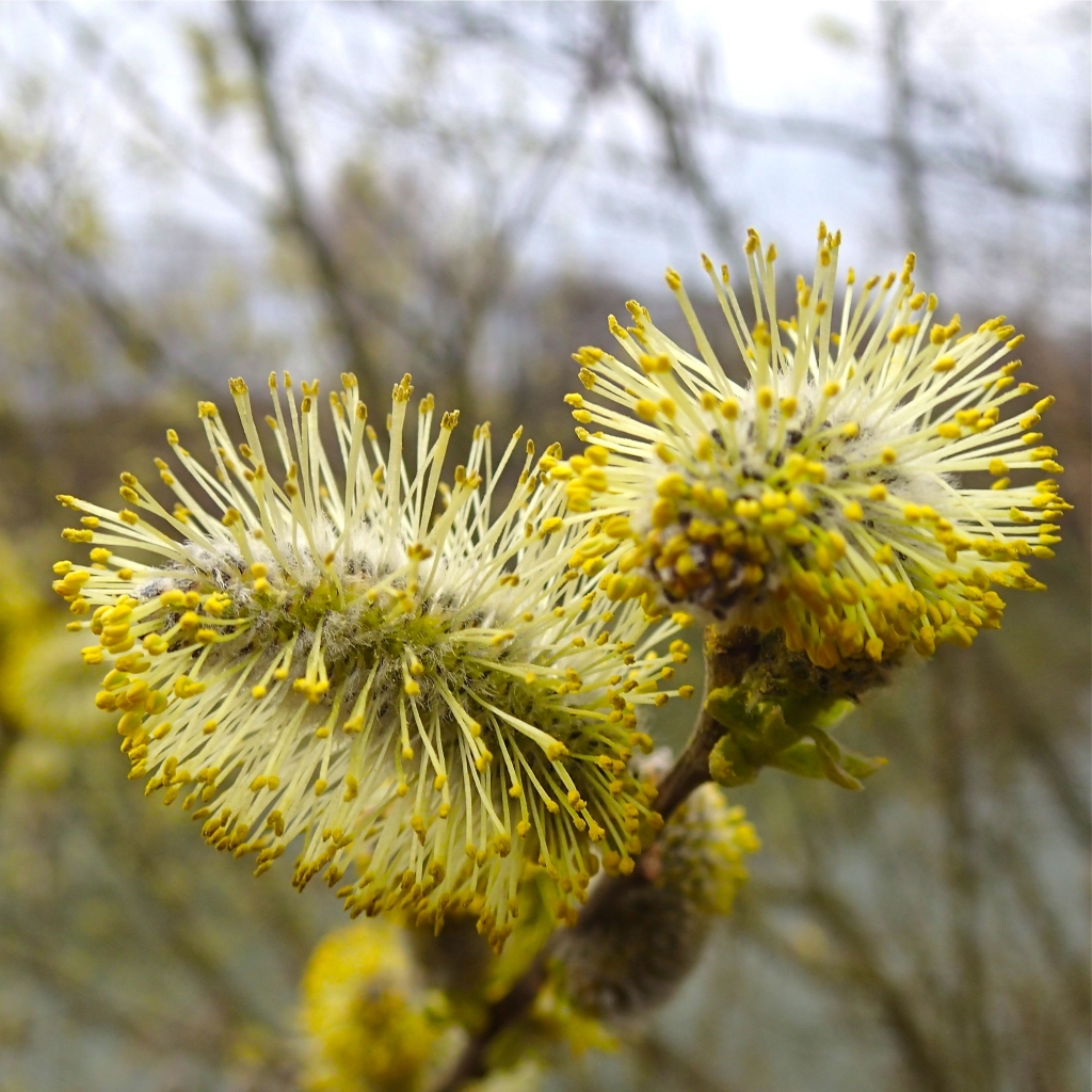 Saules marsault. Fleurs mâles.